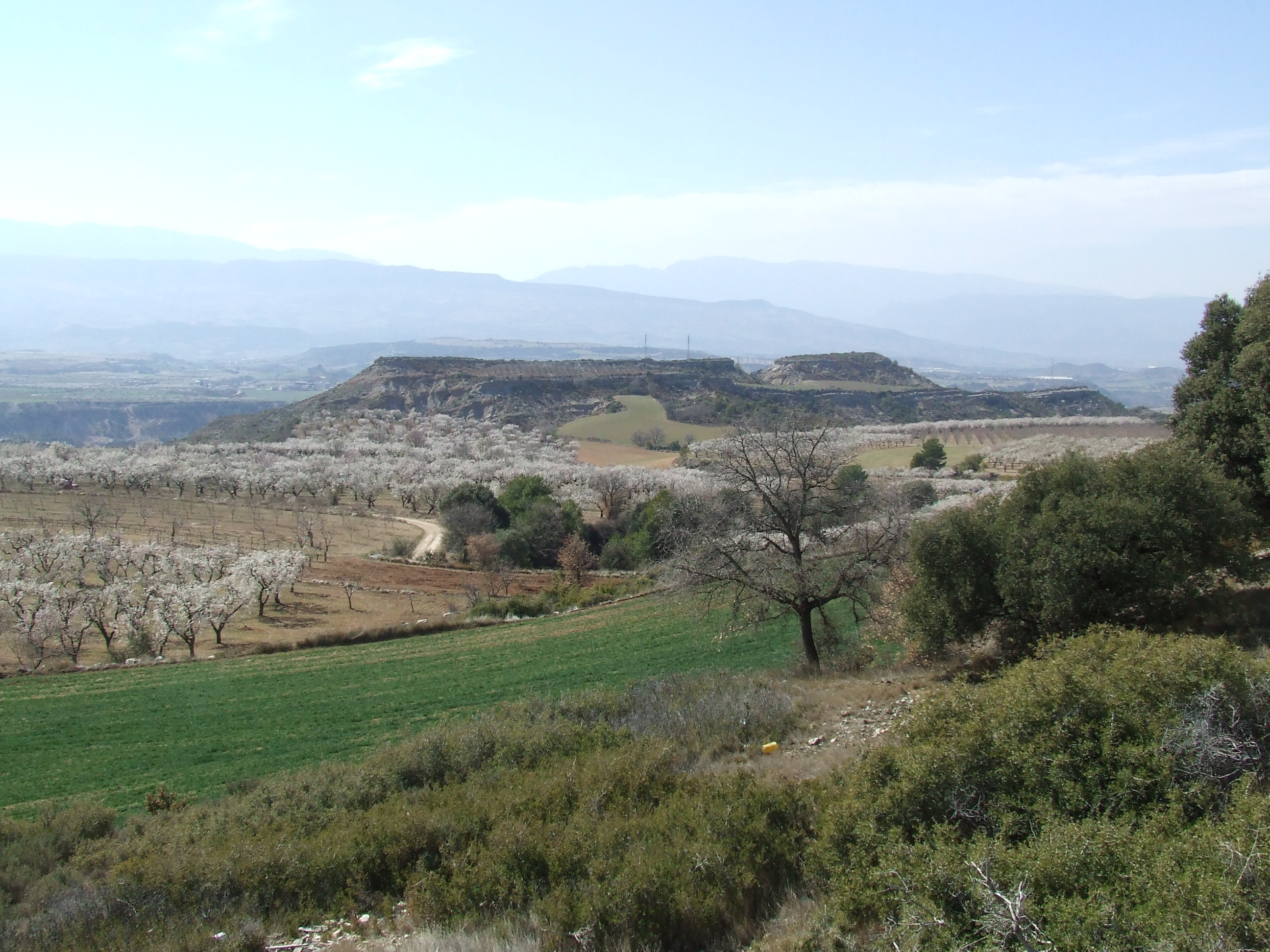 El Tossal de la Doba (Abella de la Conca i Isona i Conca Dellà, Pallars Jussà)